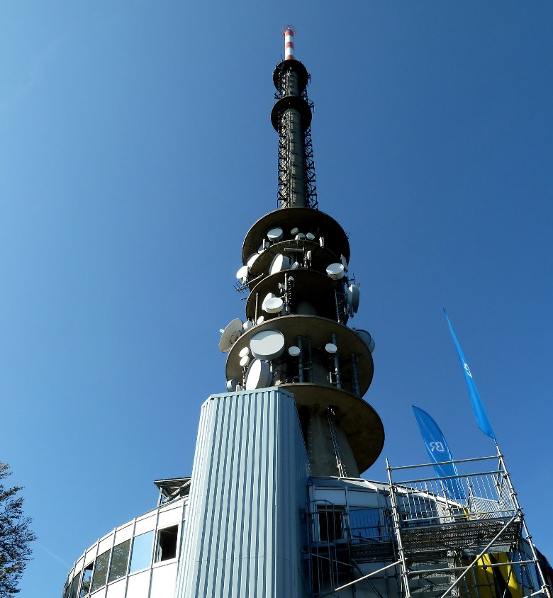 Senderanlage Brotjacklriegel bei Deggendorf in Bayern